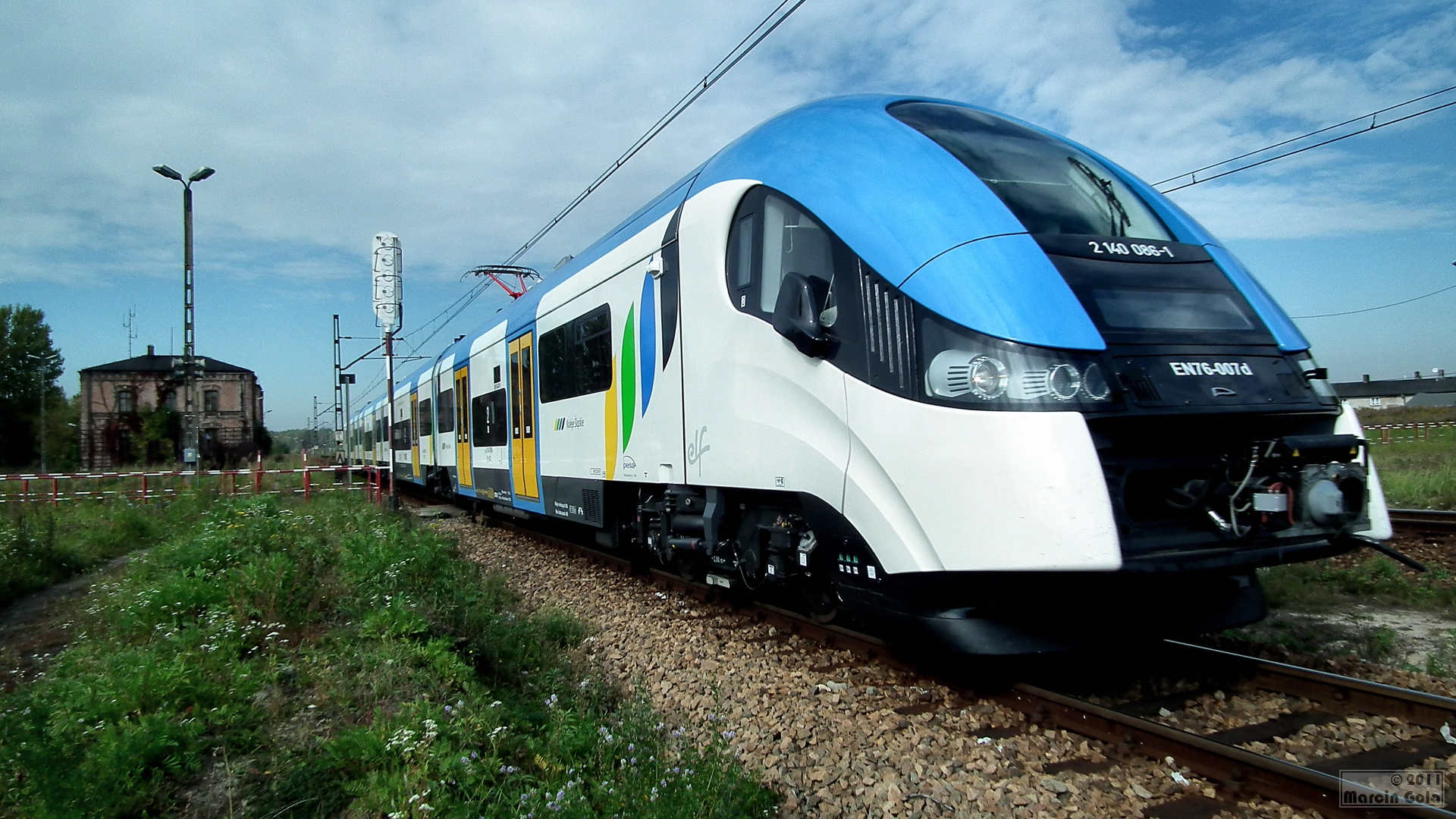 EN76-007 jako poc. osobowy KŚ 44452 relacji Gliwice-Łazy opuszcza Dąbrowę Górniczą.